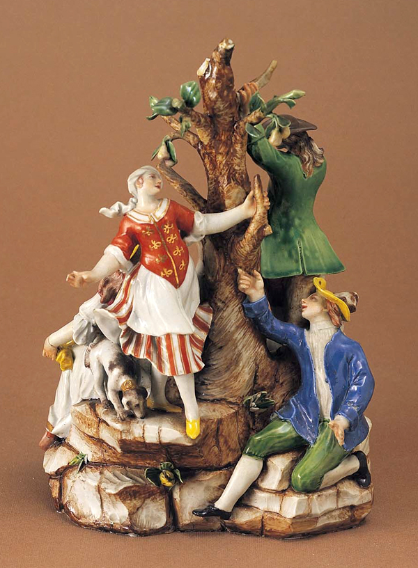 La raccolta delle pere, gruppo scultoreo in porcellana. Ginori a Doccia, ultimo quarto del XVIII secolo